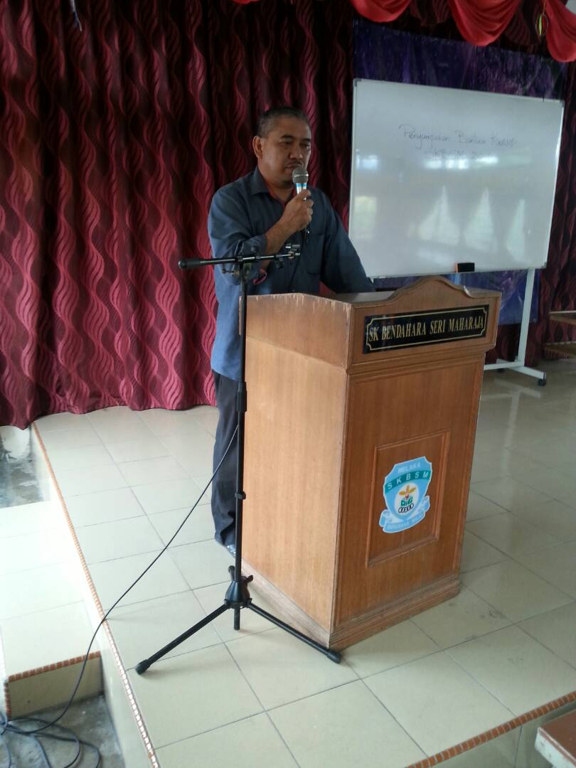 Majlis Perasmian Program Disekolah Saya